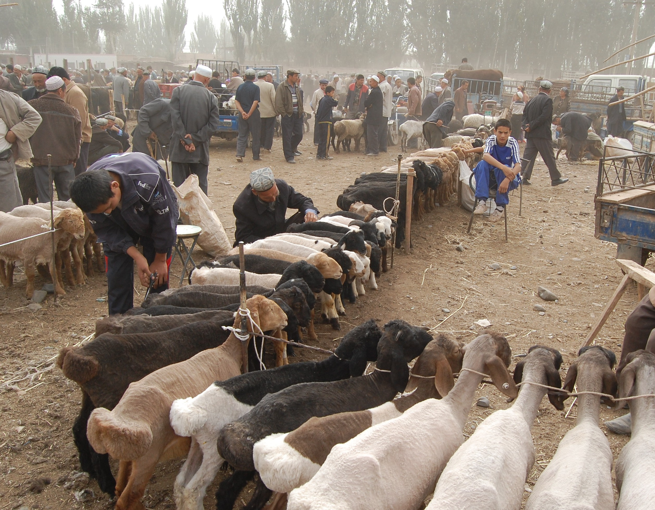 Schafe auf dem Sonntagsmarkt in Kashgar, Xinjiang, China.